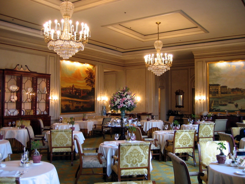 HK Ritz Hotel Central Toscana Restaurant